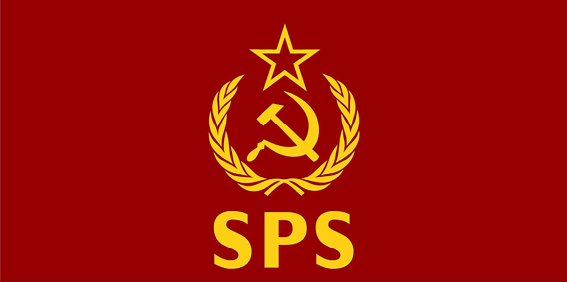 Socialistična partija Slovenije, s kratico imena SPS in s sedežem v Kamniku, Ulica Jakoba Zupana 7. Znak stranke je logotip SPS. Kratica SPS je rumene barve, na rdeči podlagi. Znak sta prekrižano kladivo in srp, nad katerima je prazna peterokraka rumena zvezda. Oba znaka sta obdana z vencem, ki poteka od spodaj po levi in desni strani proti vrhu do polovice zvezde. Kladivo in srp, zvezda in venec je rumene barve, koda barve pa #fcd115, podlaga je rdeče barve, katere koda je #95000.